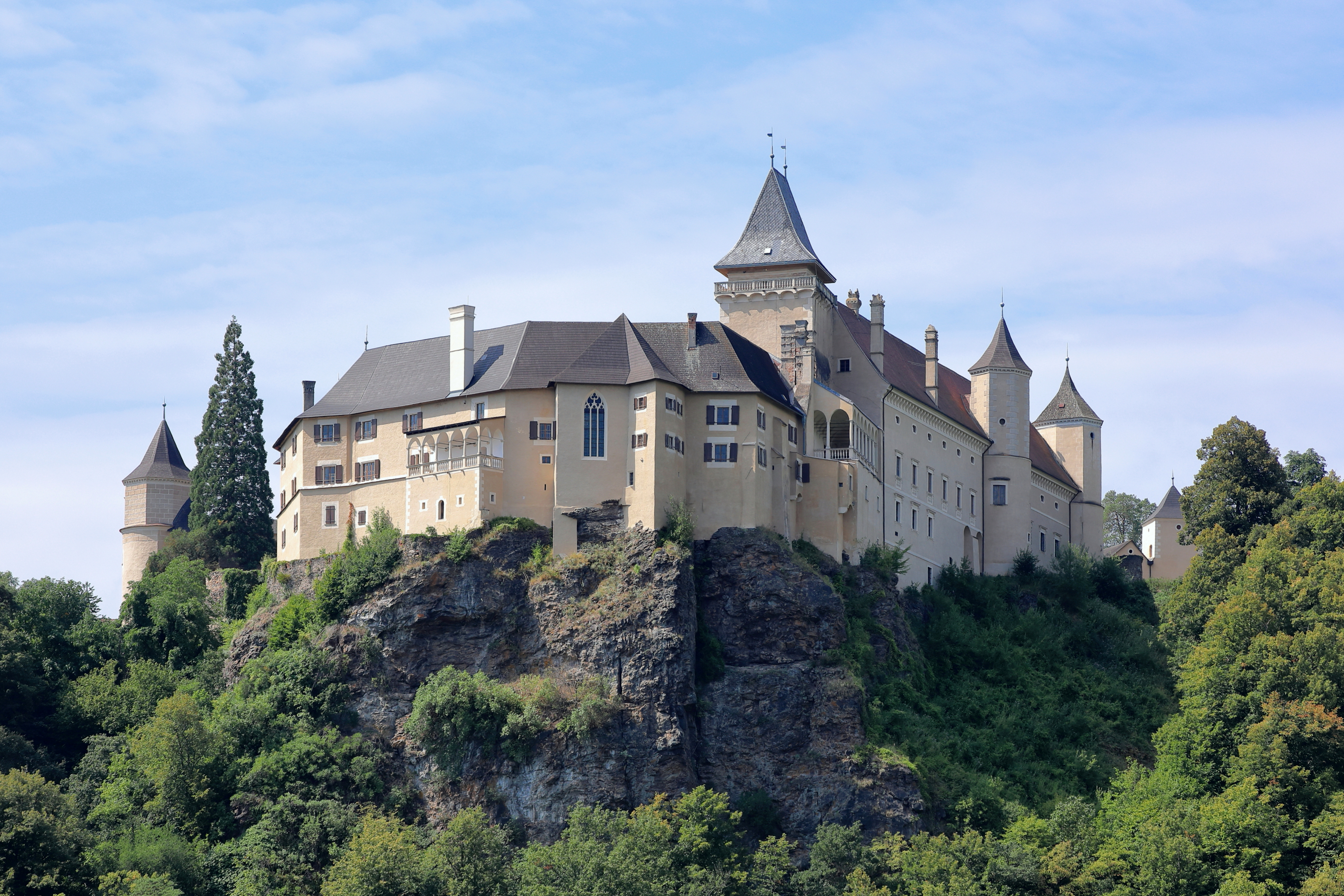 Nordostansicht des Schlosses Rosenburg in Rosenburg, ein Ortsteil der niederösterreichischen Gemeinde Rosenburg-Mold.Ursprünglich eine mächtige mittelalterliche Burg in Berglage über dem Kampufer. Ende des 16. Jahrhunderts erfolgte ein Umbau zu einem Renaissanceschloss und in der 2. Hälfte des 17. Jahrhunderts ein weiterer Ausbau. Nach einem Brand 1800 verfiel das Schloss. Zwischen 1859 und 1875 ließ Ernst Karl von Hoyos-Sprinzenstein die vom Verfall bedrohte Rosenburg nach den Darstellungen des Schlosses in der Topographia Windhagiana von 1673 orientierend, umfassend restaurieren und machte sie als eine der ersten Burgen in Österreich öffentlich zugänglich.